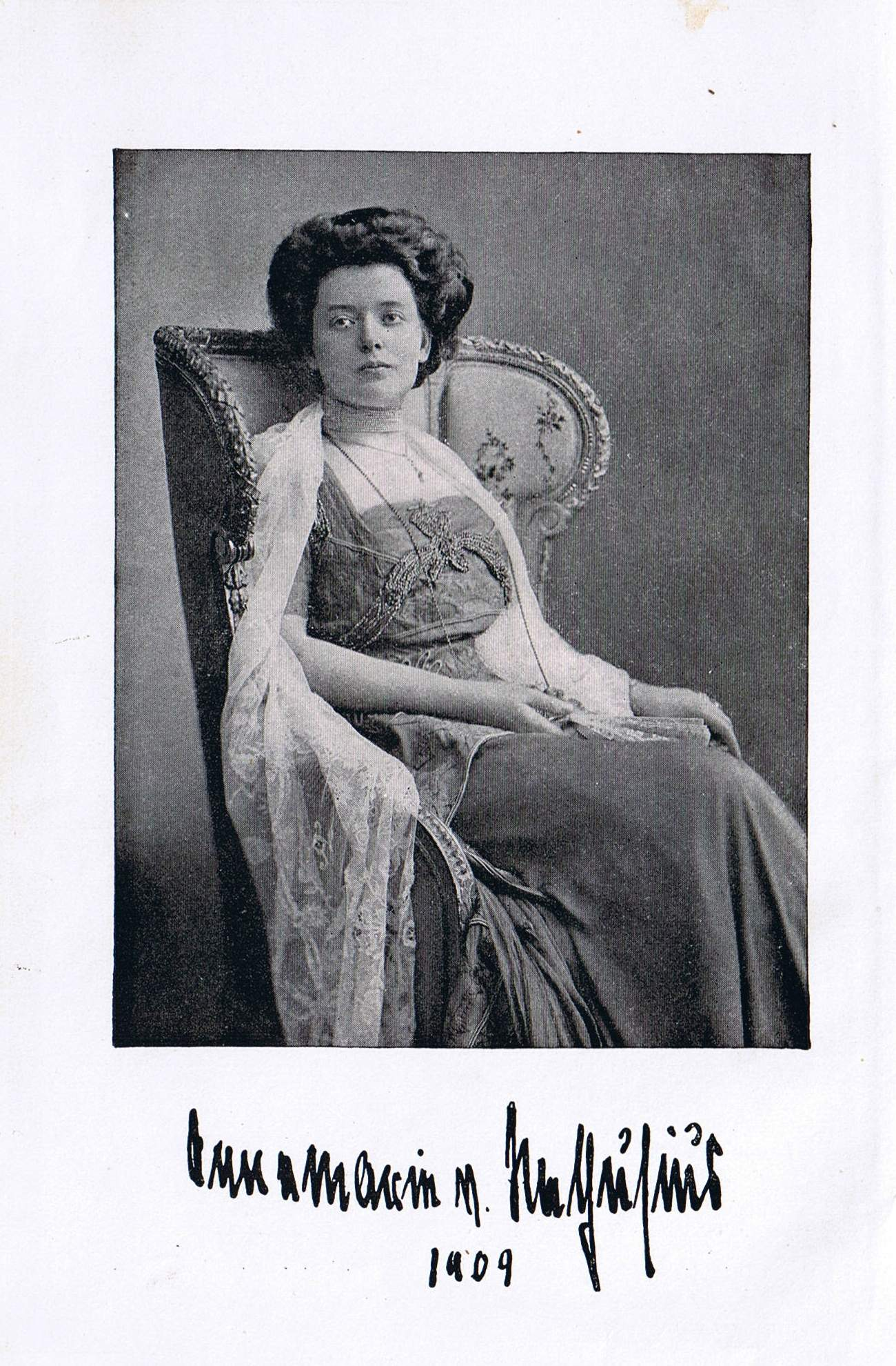 Annemarie von Nathusius, German author